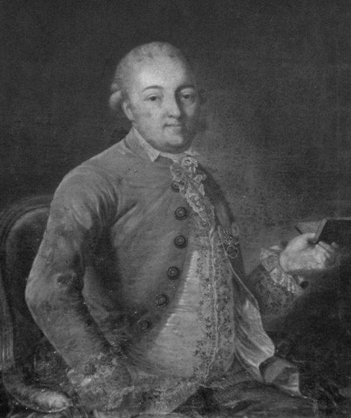 Kristián Filip Clam-Gallas (1748-1805), český šlechtic a mecenáš